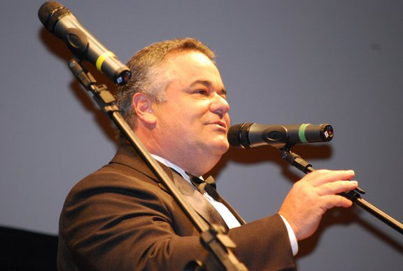 O ex-prefeito de Paulínia, José Pavan Júnior, discursa na abertura do II Festival Paulínia de Cinema.